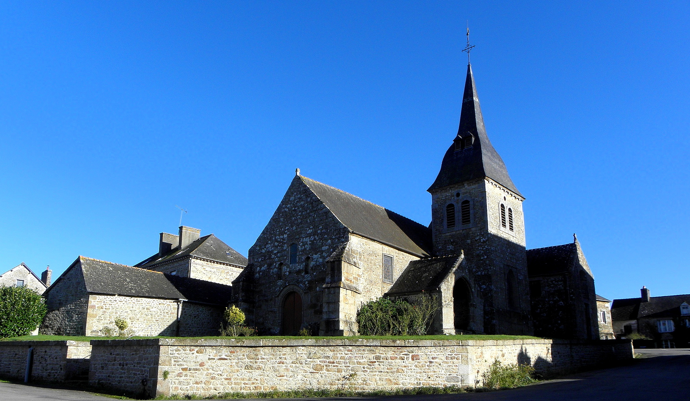 Église Saint-Pierre-et-Saint-Paul de Romazy (35). Façade occidentale et flanc sud.